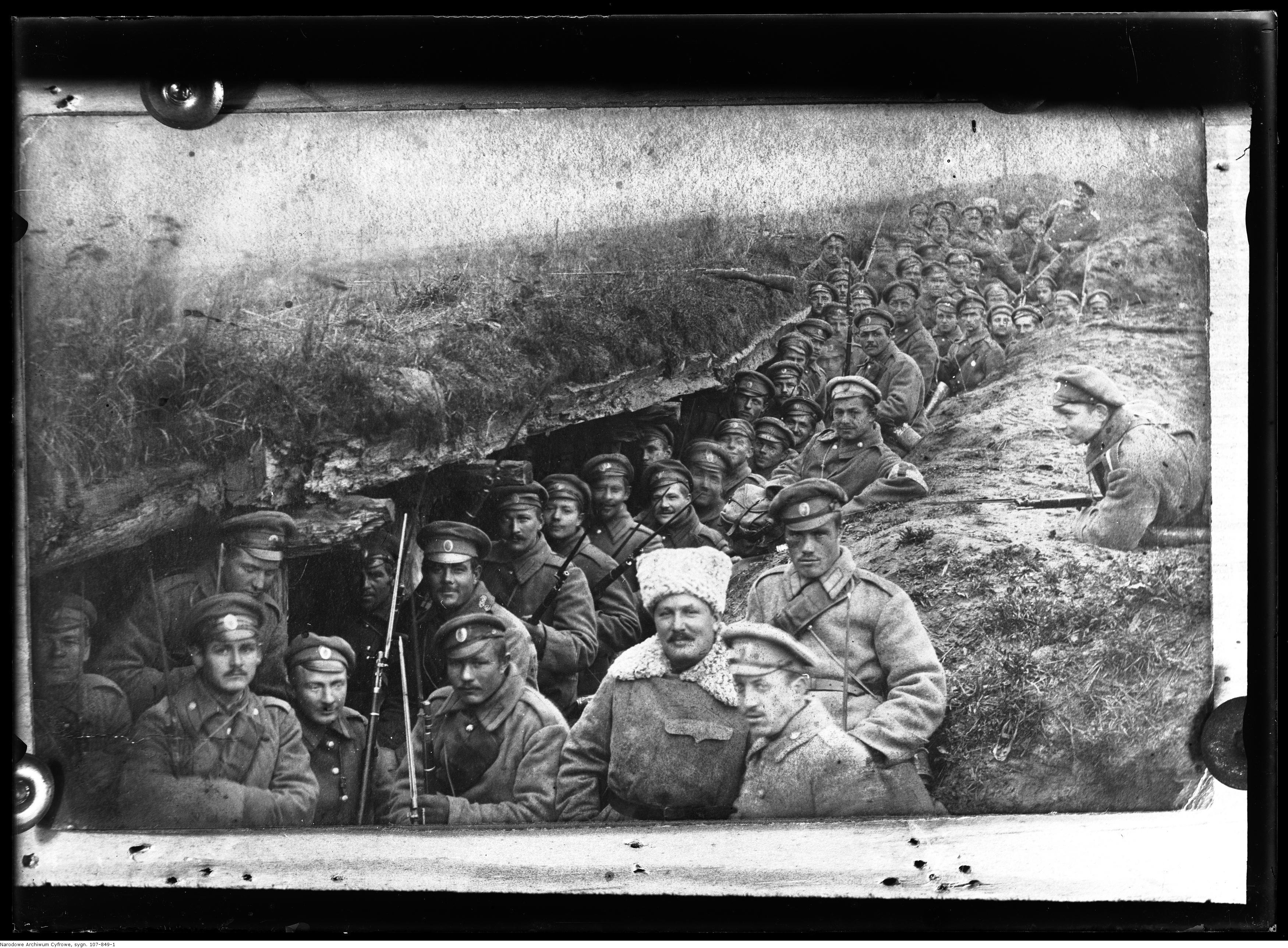 2 Szwadron w okopach. Reprodukcja fotografii pochodzącej z lat 1917-1918.